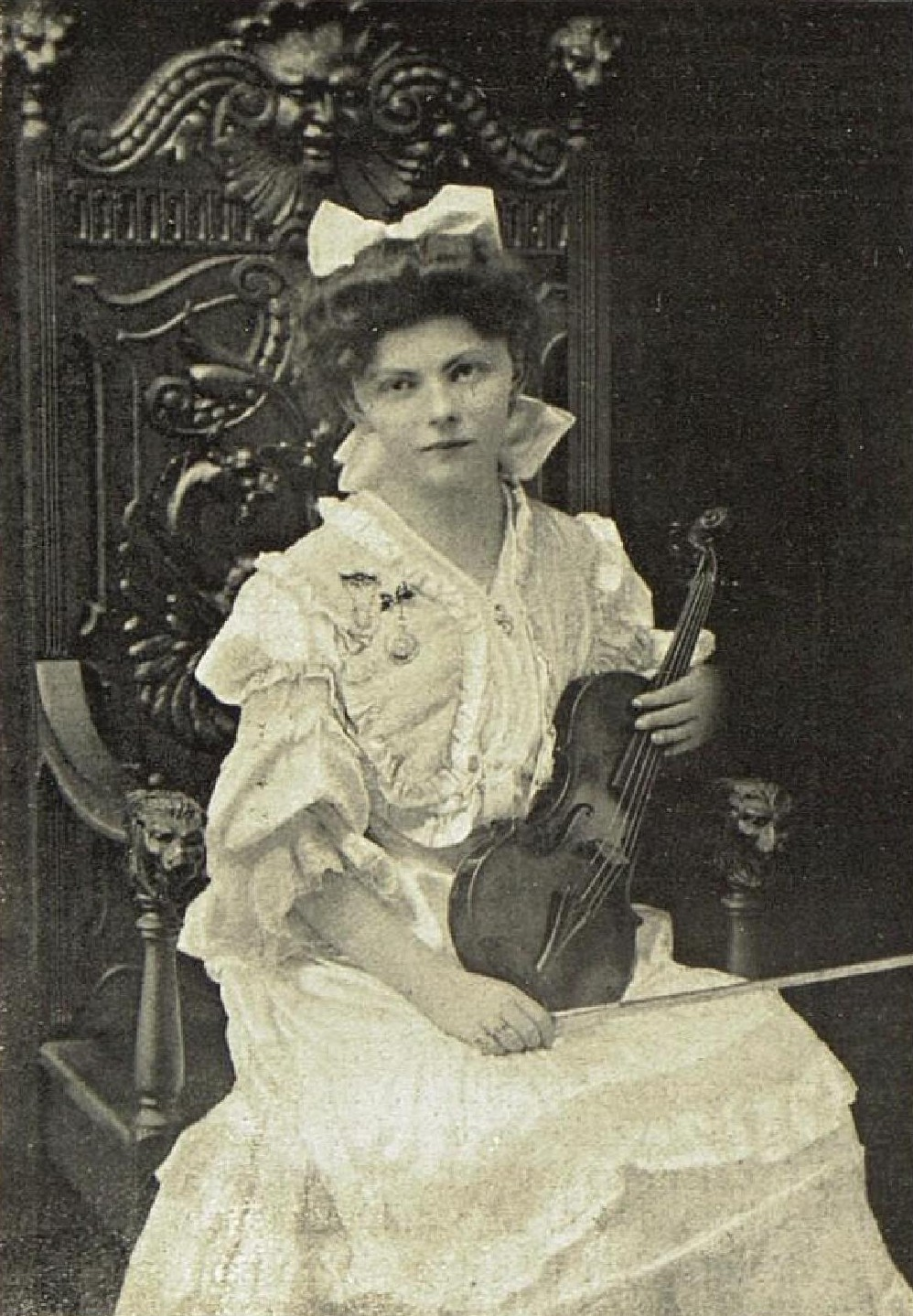 Marie Heritesová, česká houslistka a hudební pedagožka.